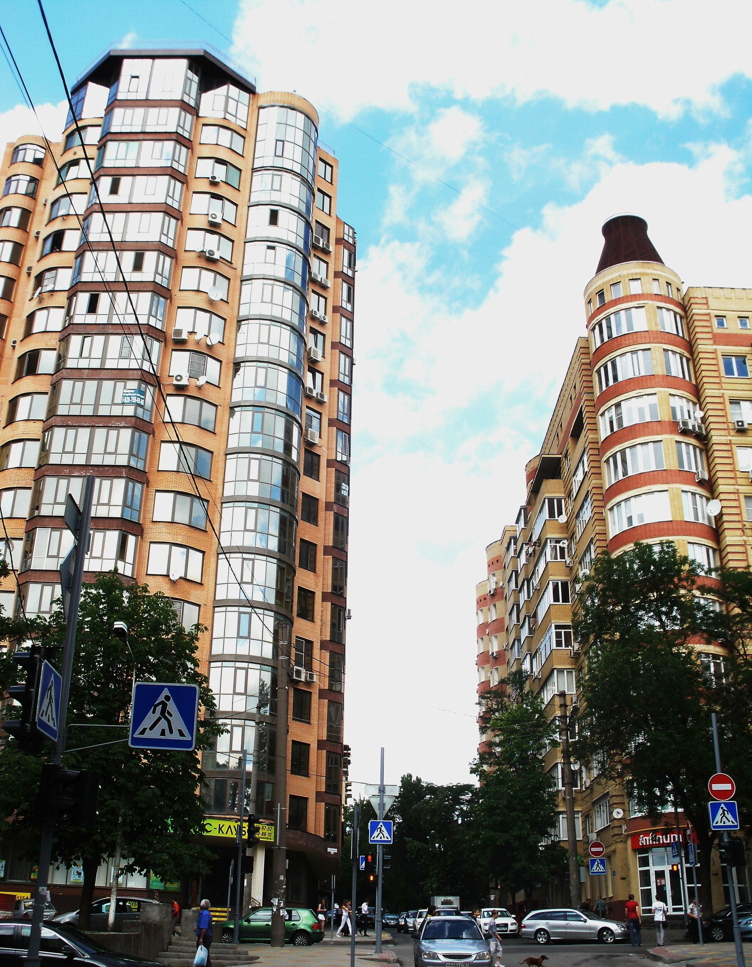 Халтуринский переулок на пересечении с Пушкинской улицей, Ростов-на-Дону